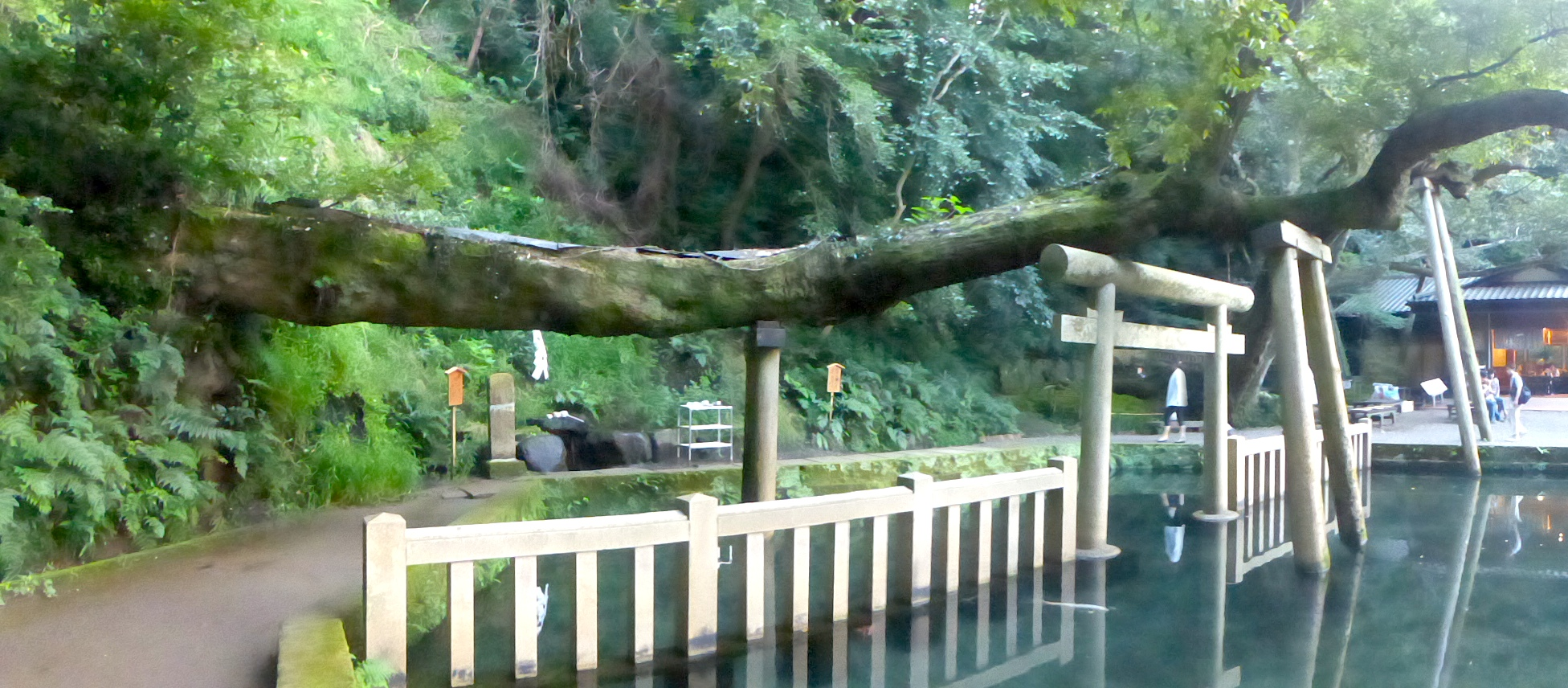 鹿島神宮 御手洗池 (Kashima jiingu Mitarashi reflecting pool)